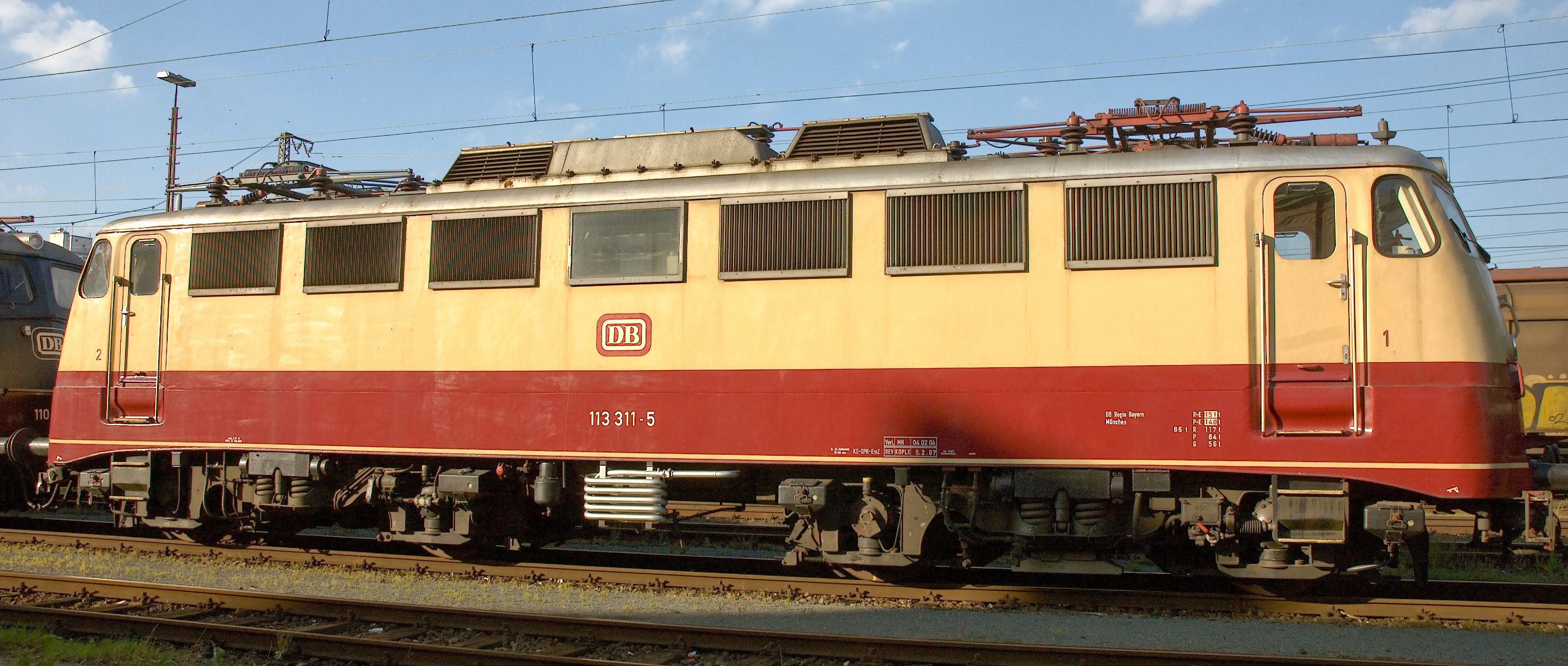 Lok der DB-Baureihe E10